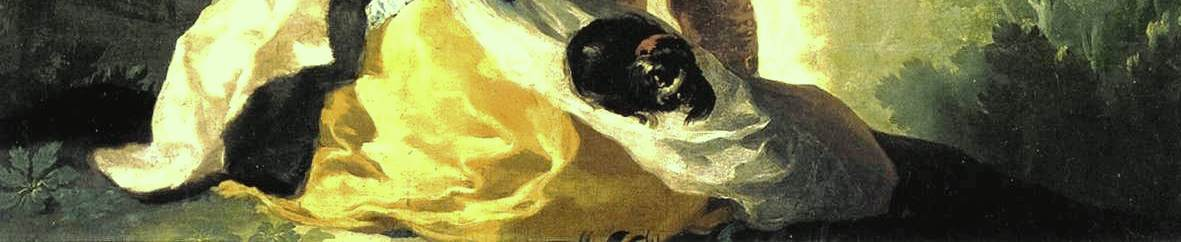 detail